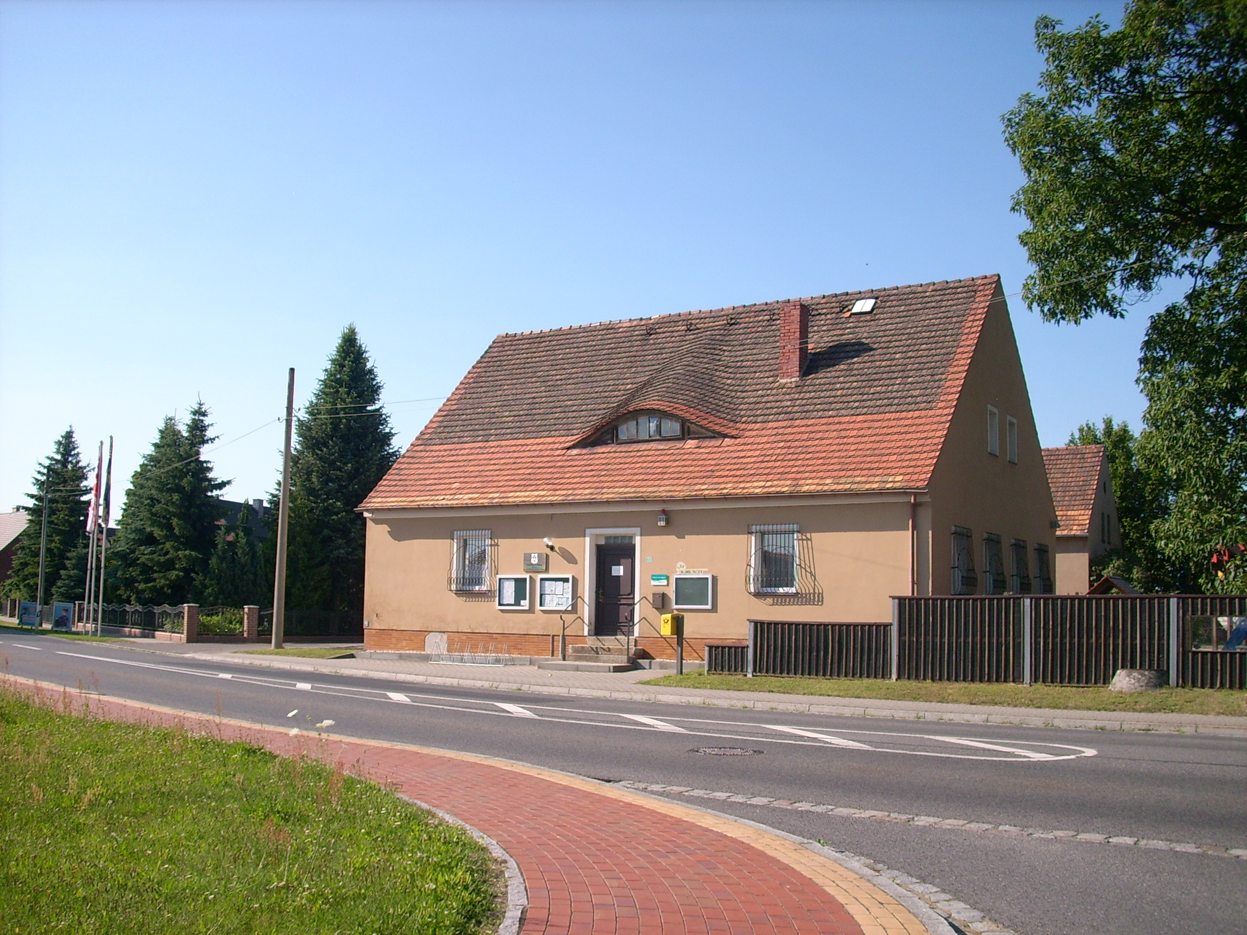 Gemeindeverwaltung in Bluno Hornjoserbsce: Blunjanske gmejnske zarjadnistwo